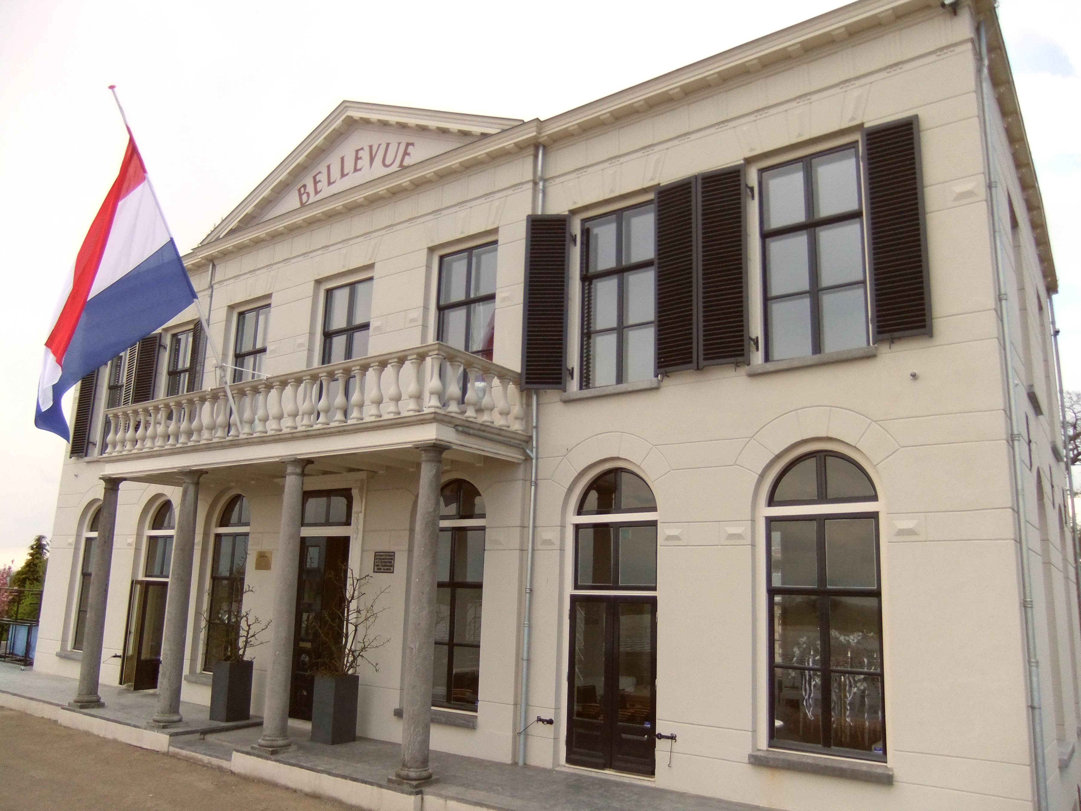 Tiel Rijksmonument 35584 Bellevue, Ophemertsedijk 2 71″ N, 5° 26′ 14.46″ E